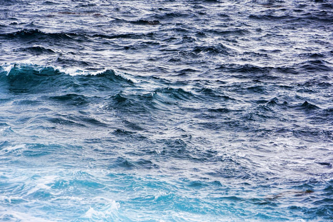 big sur